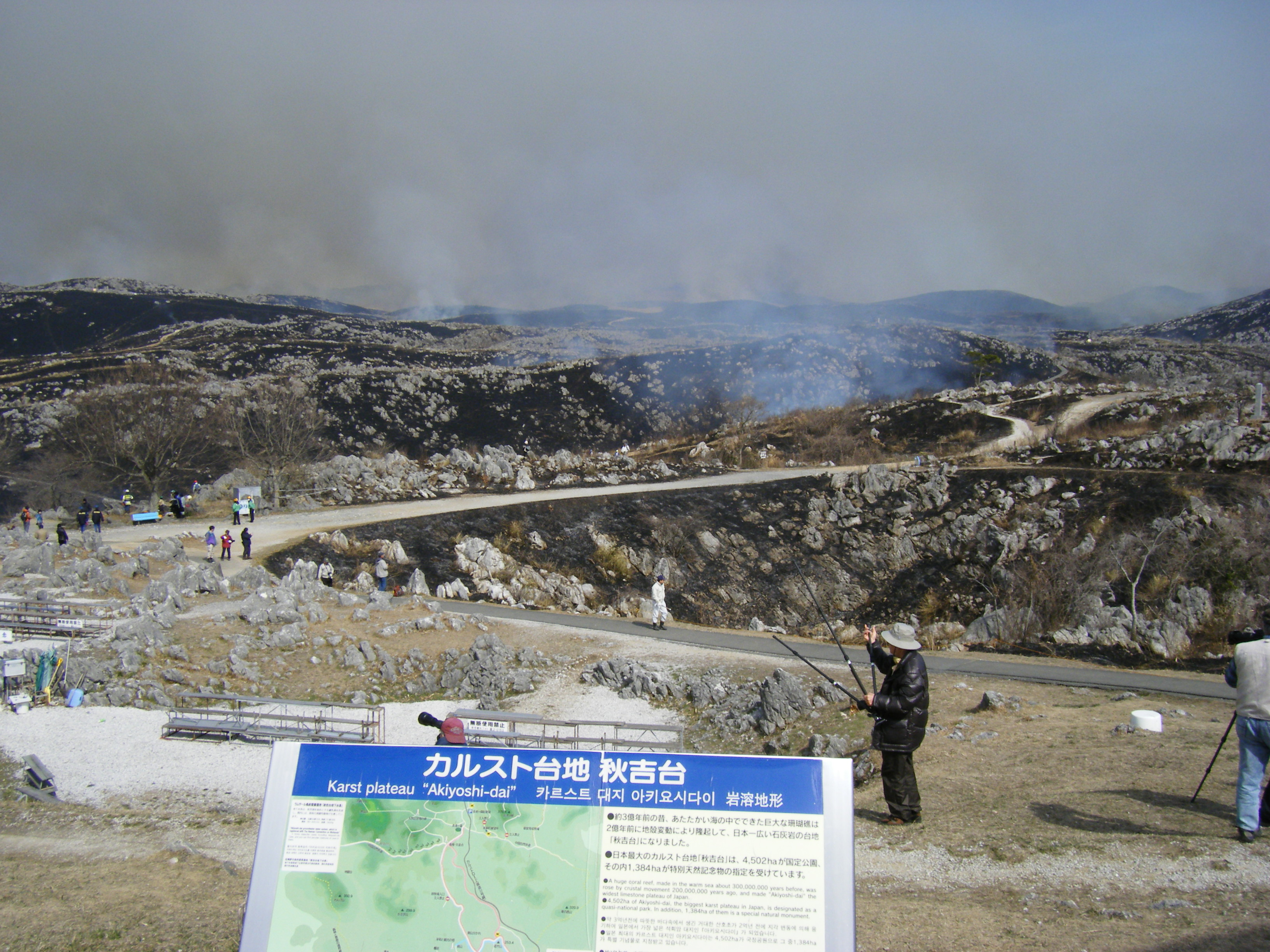 秋吉台の野焼き